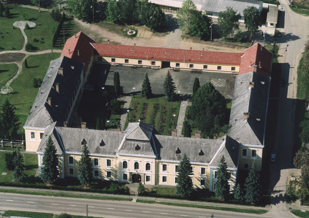 Keglevich Castle (Pétervására, Hungary)